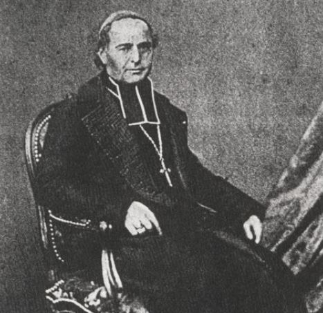 Photographie en noir et blanc de Mgr Joseph Baudichon, seconde moitié du XIXe siècle.